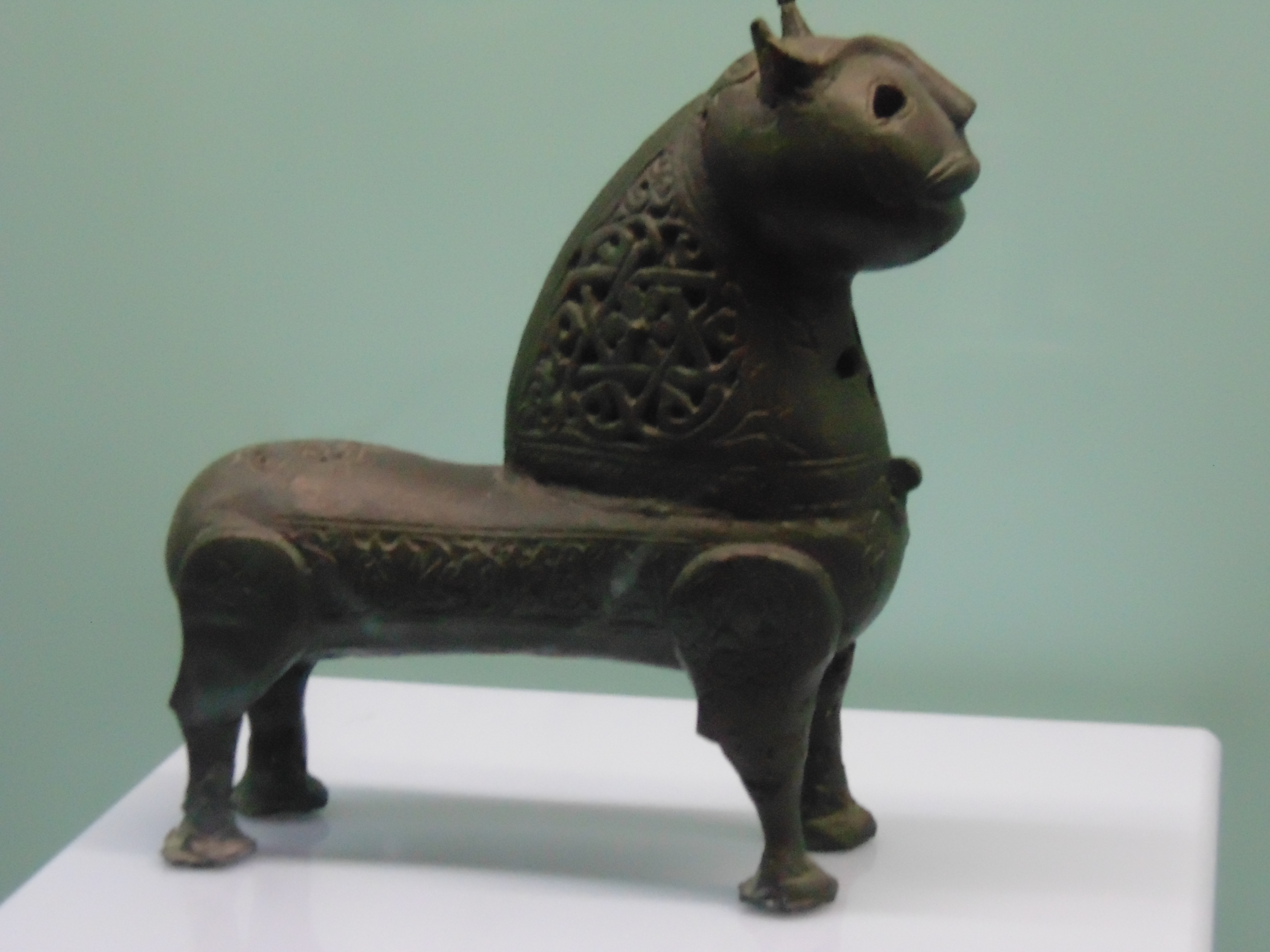 Миниатюрная скульптура тигра (Хуталан X век). Экспонат находится в Национальном музее Таджикистана (Душанбе).